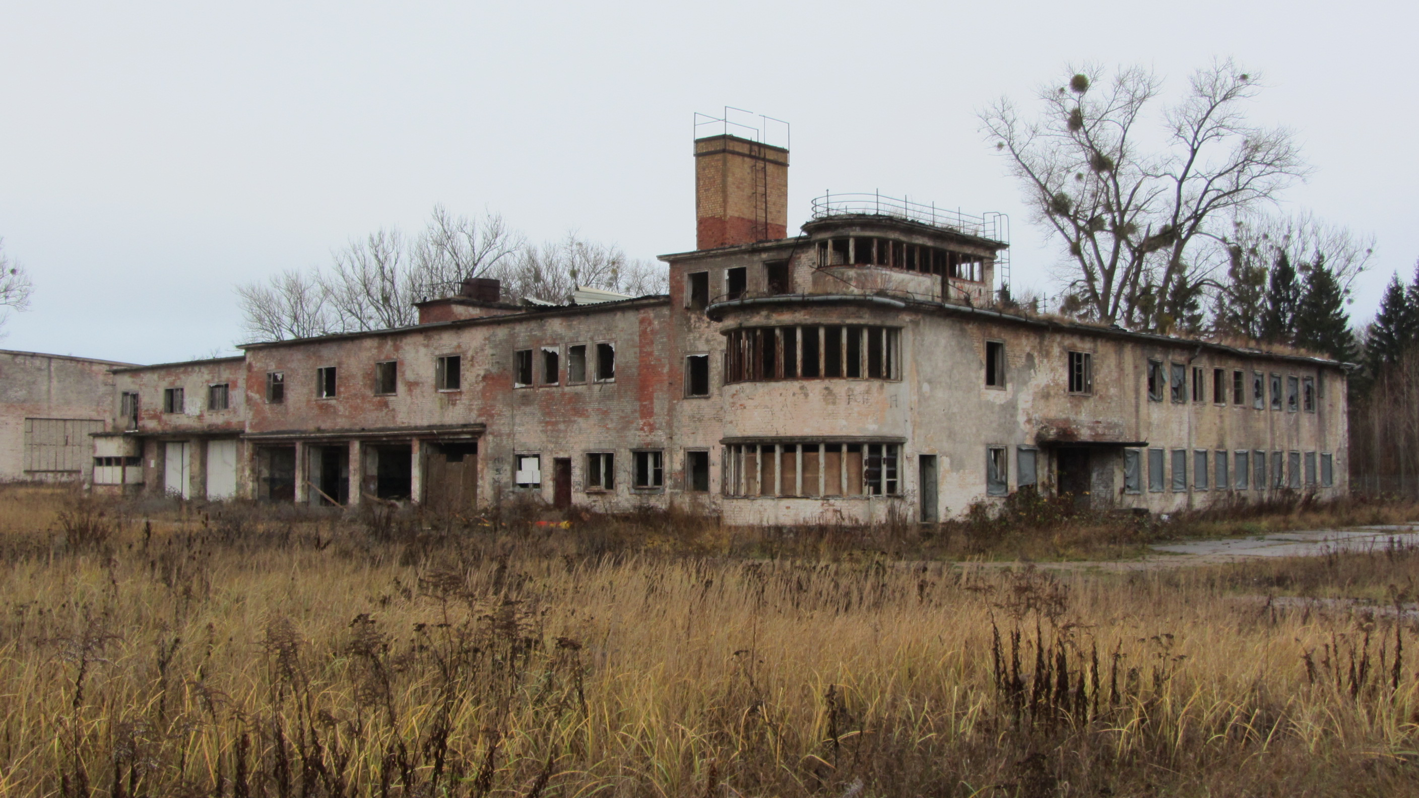 Flugleitzentrum Fliegerhorst Schwerin-Görries